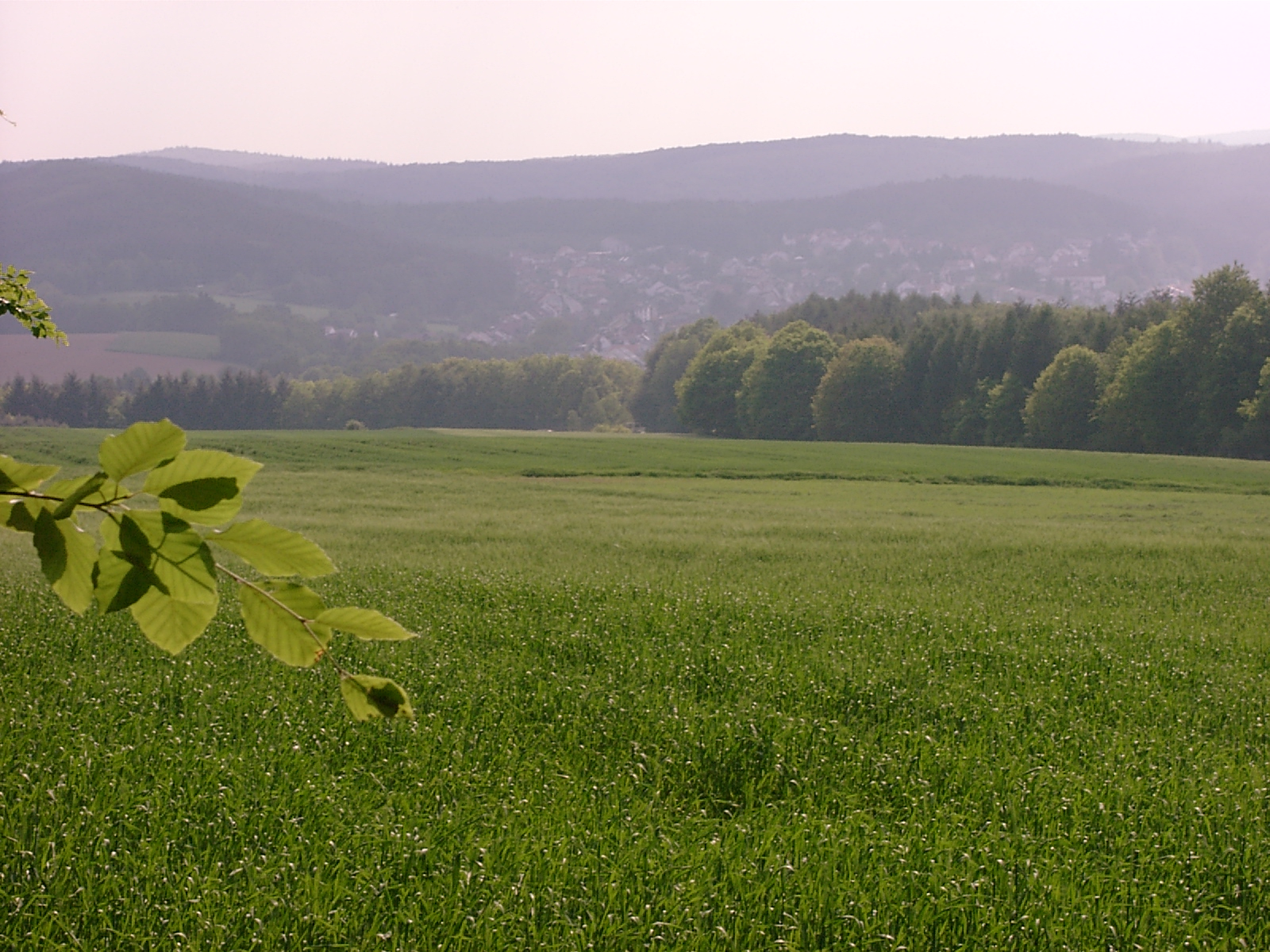 Hochspeyer_Fernansicht